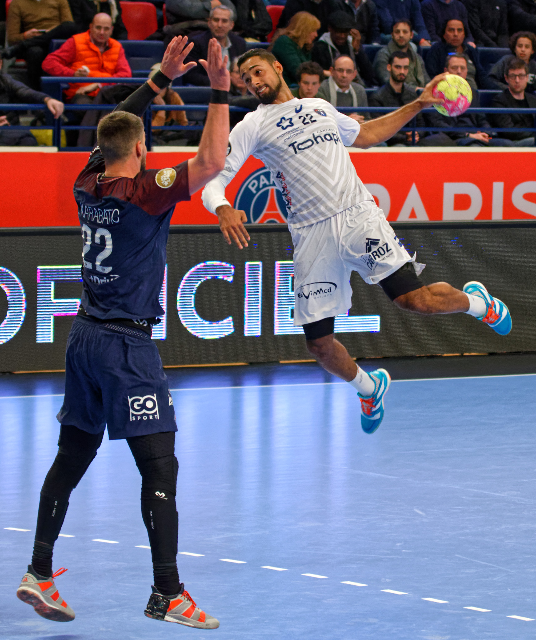 Rencontre de championnat entre le PSG et Montpellier. A Coubertin, le 1er mars 2018.